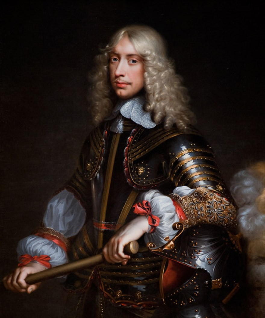 Portrait de François de Bourbon, duc de Beaufort (1616-1669)